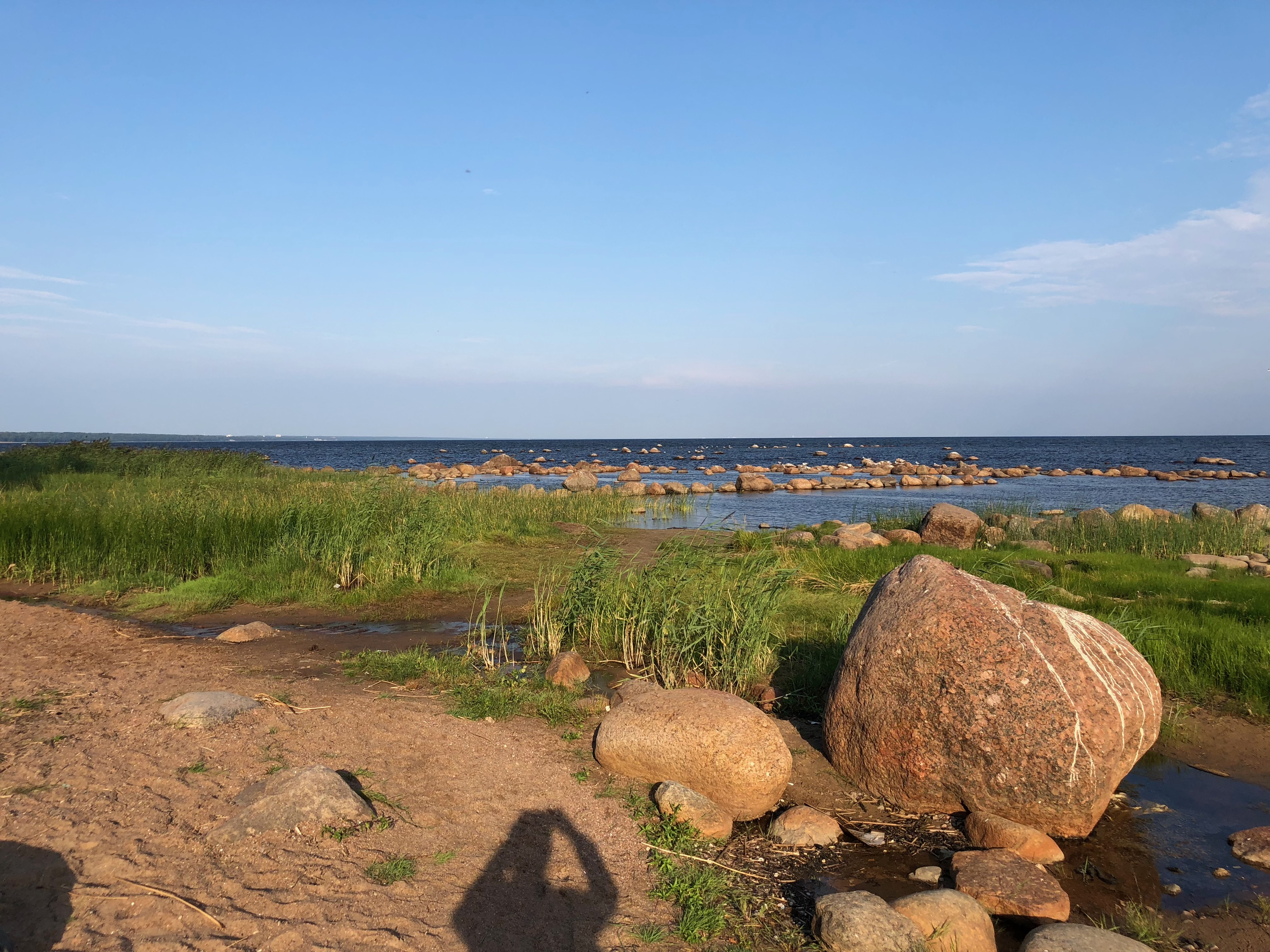 Финский залив